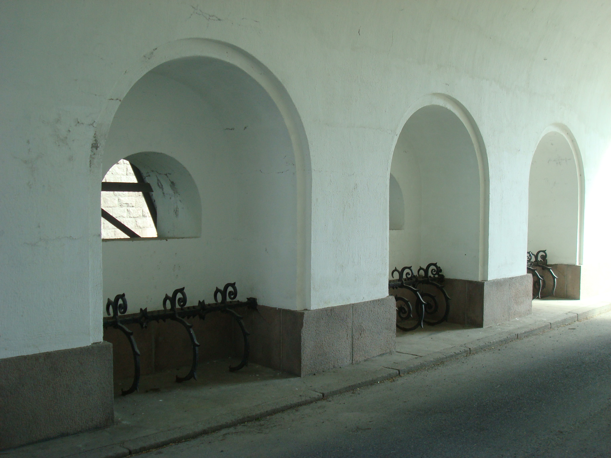 Sannerbrua i Oslo.